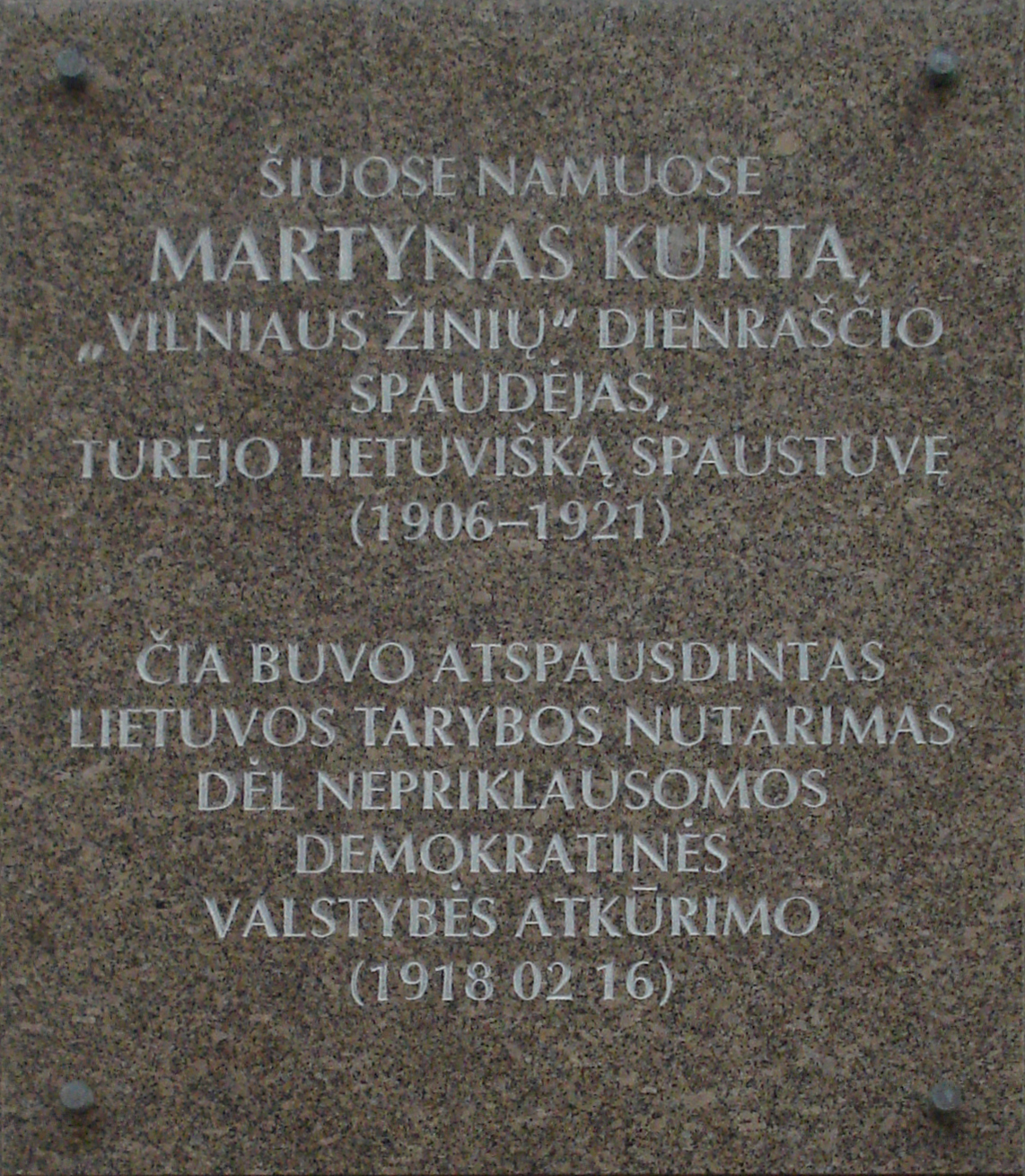 Martynas Kukta (publisher) memorial tablet in Vilnius (Totoriu g.)